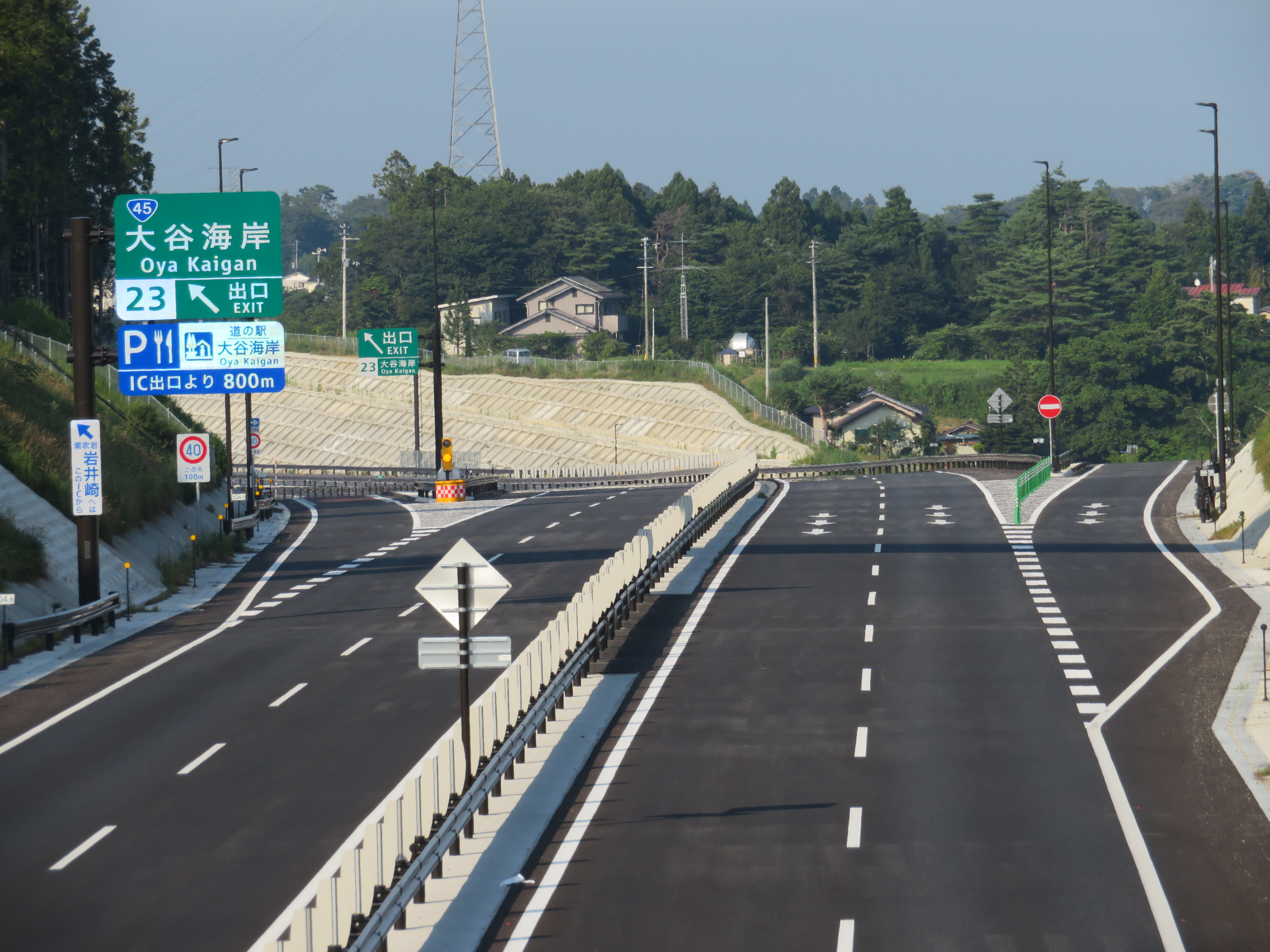 三陸自動車道大谷海岸IC出入口付近（気仙沼中央IC方面を撮影）